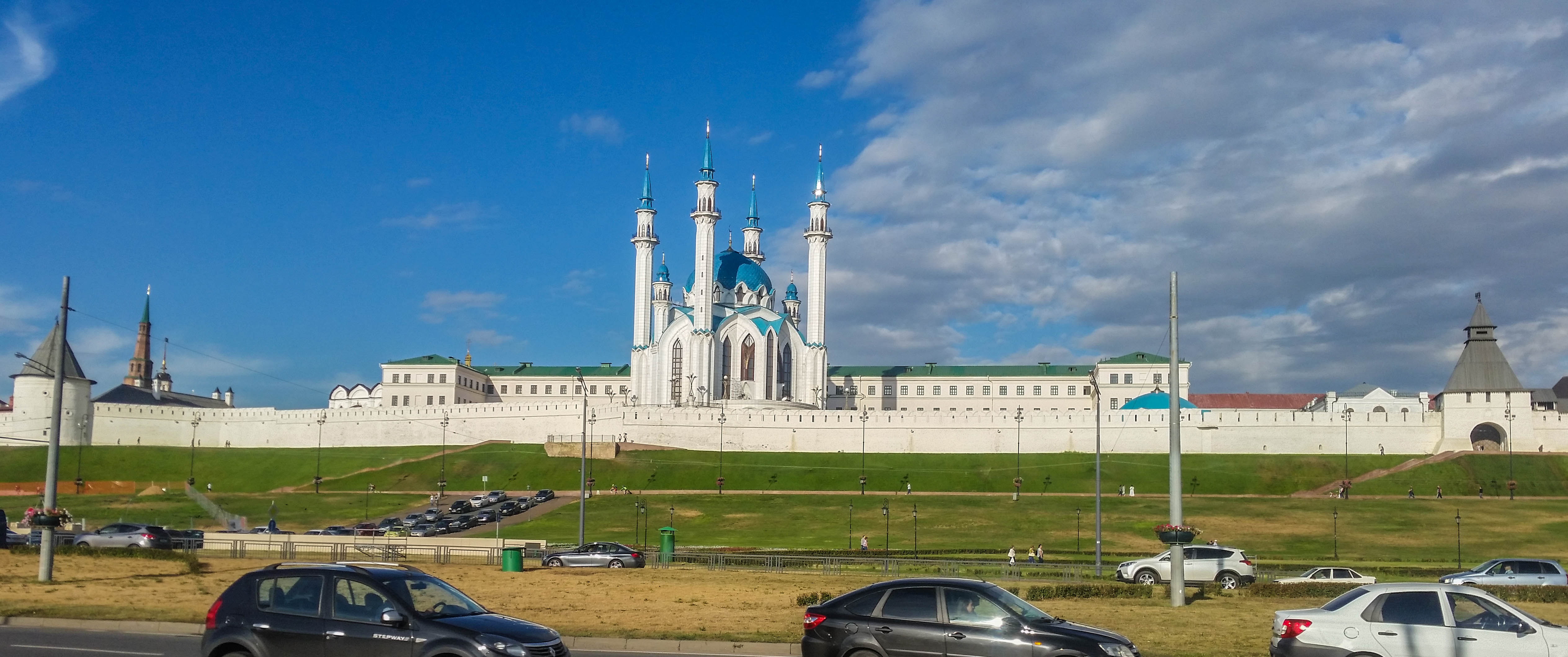 Городище Казанский Кремль: Кремль, Казань, Татарстан